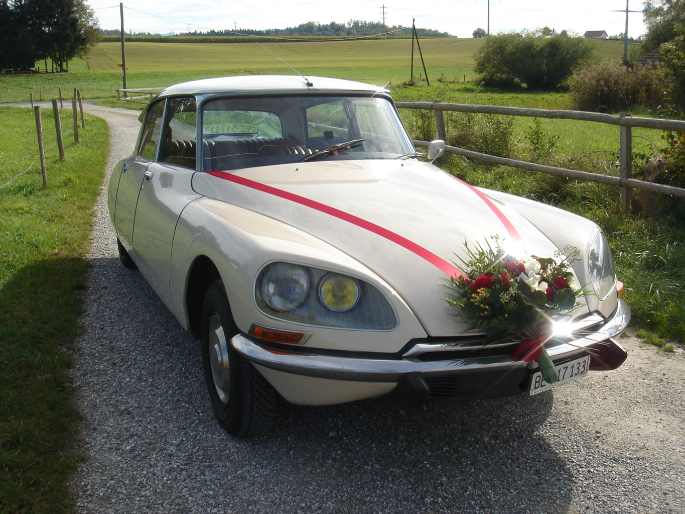 die altmodische variante des brautpaar-transportmittels